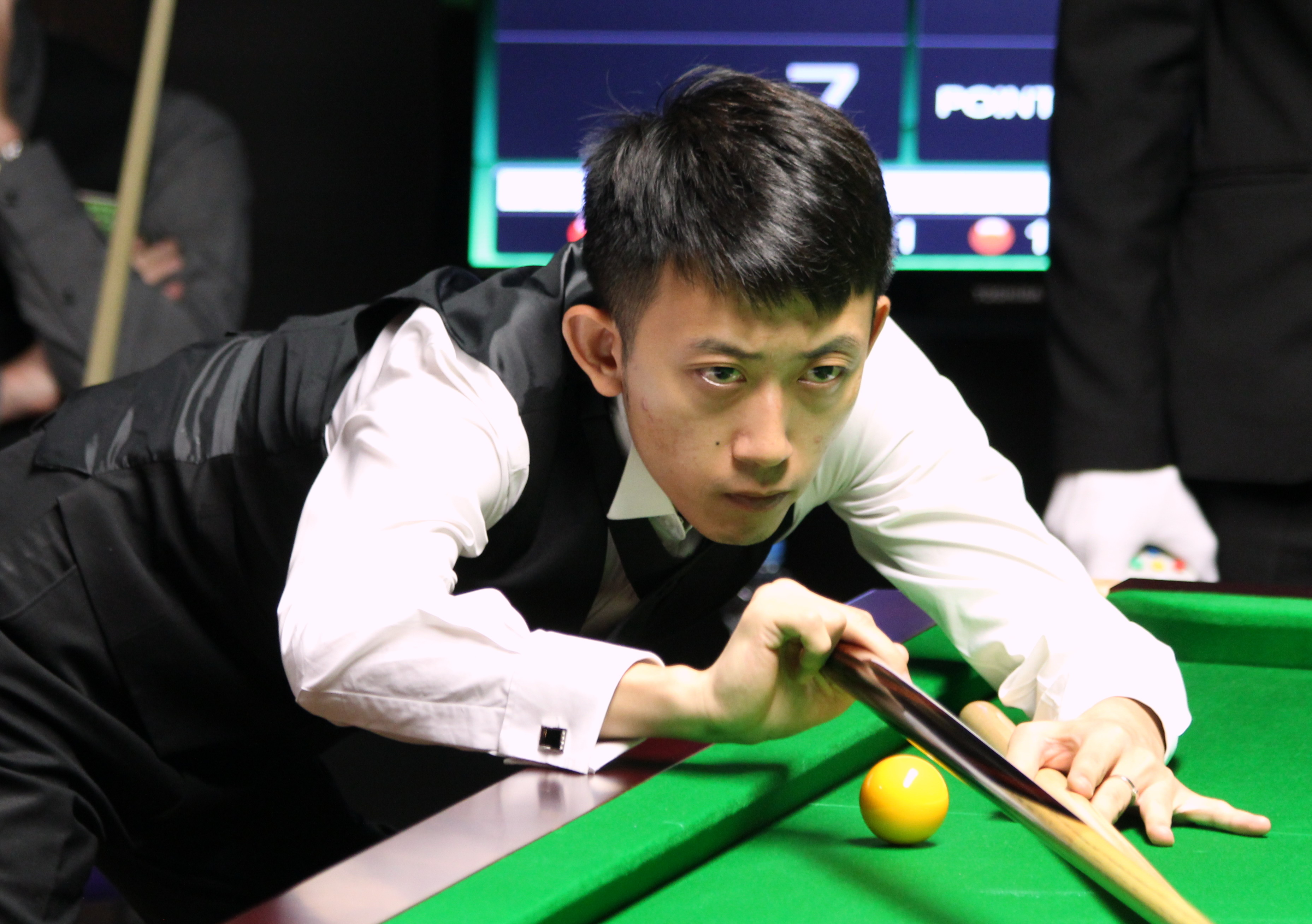 Chen Zhe beim Paul Hunter Classic 2016